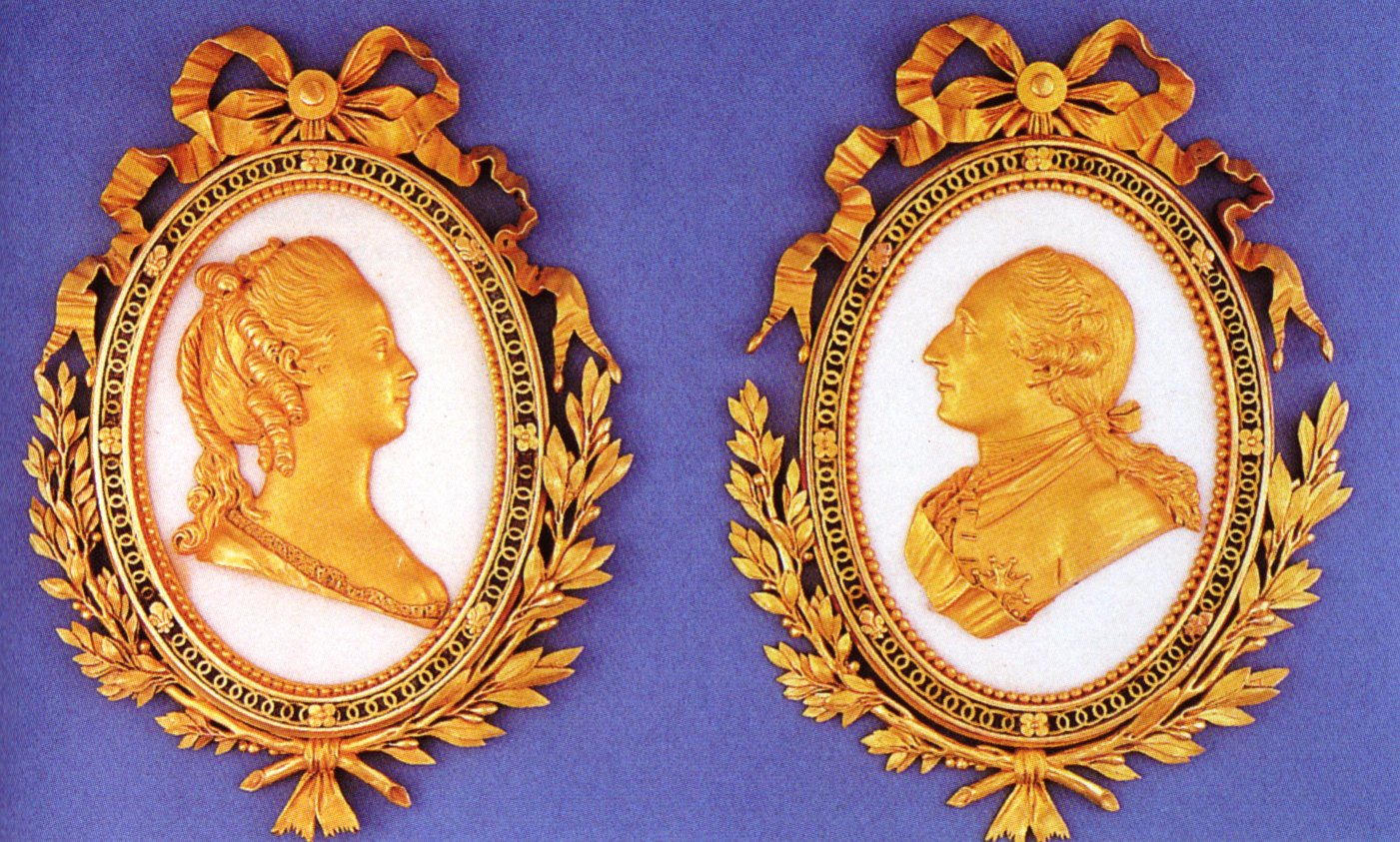 Medaglioni commemorativi dell'incoronazione di Luigi XVI e di Maria Antonietta